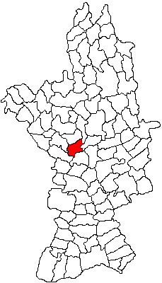 Categorie:Hărţi ale judeţului Olt